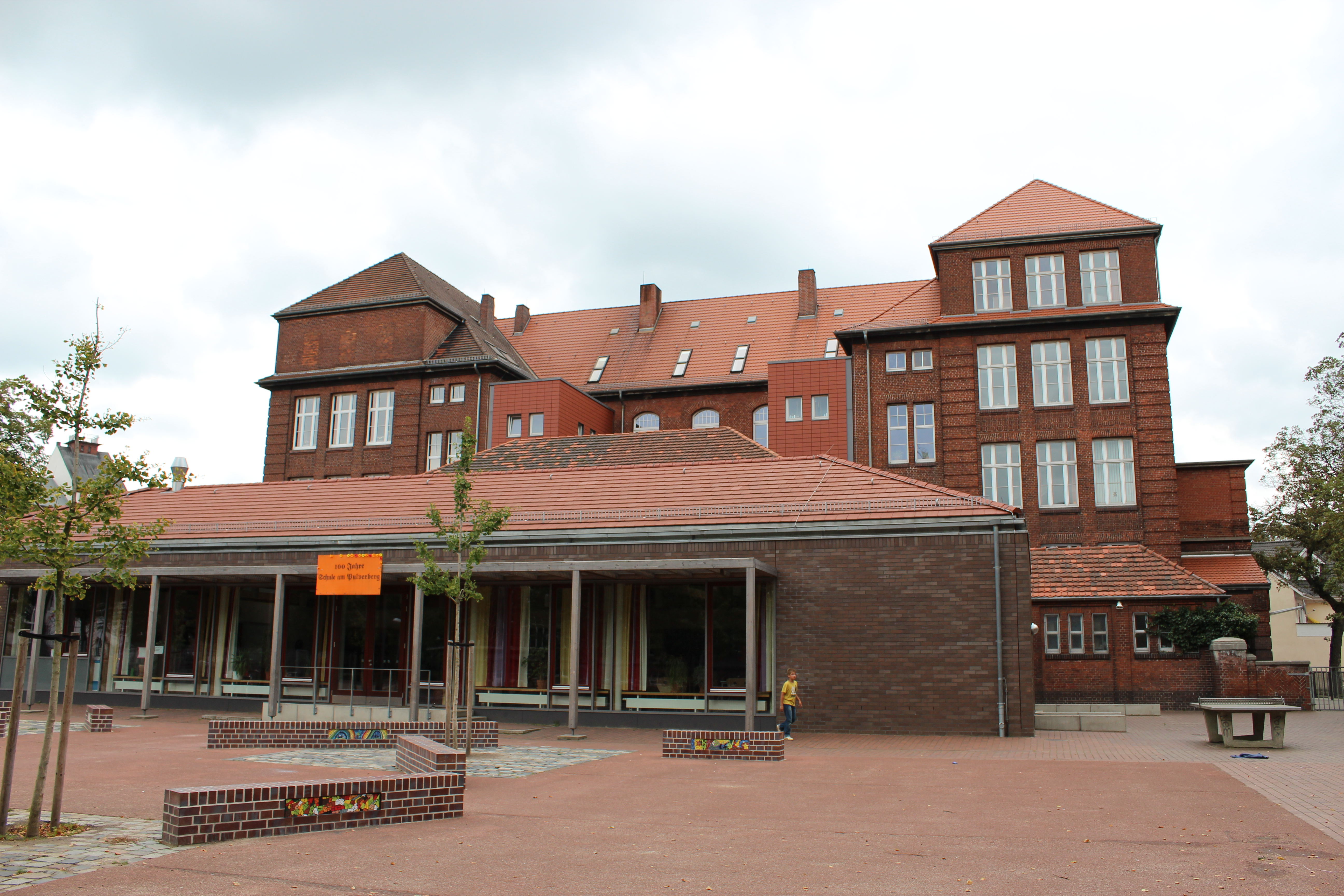 Unentgeltliche Volksschule am Pulverberg, Volksschule, Grundschule Pulverberg, Schule am Pulverberg in Bremen, Schleswiger Straße 10 / Theodorstraße 18.Das abgebildete Objekt ist ein geschütztes Kulturdenkmal in der Freien Hansestadt Bremen, mit der Nr. 1106 beim Landesamt für Denkmalpflege registriert.